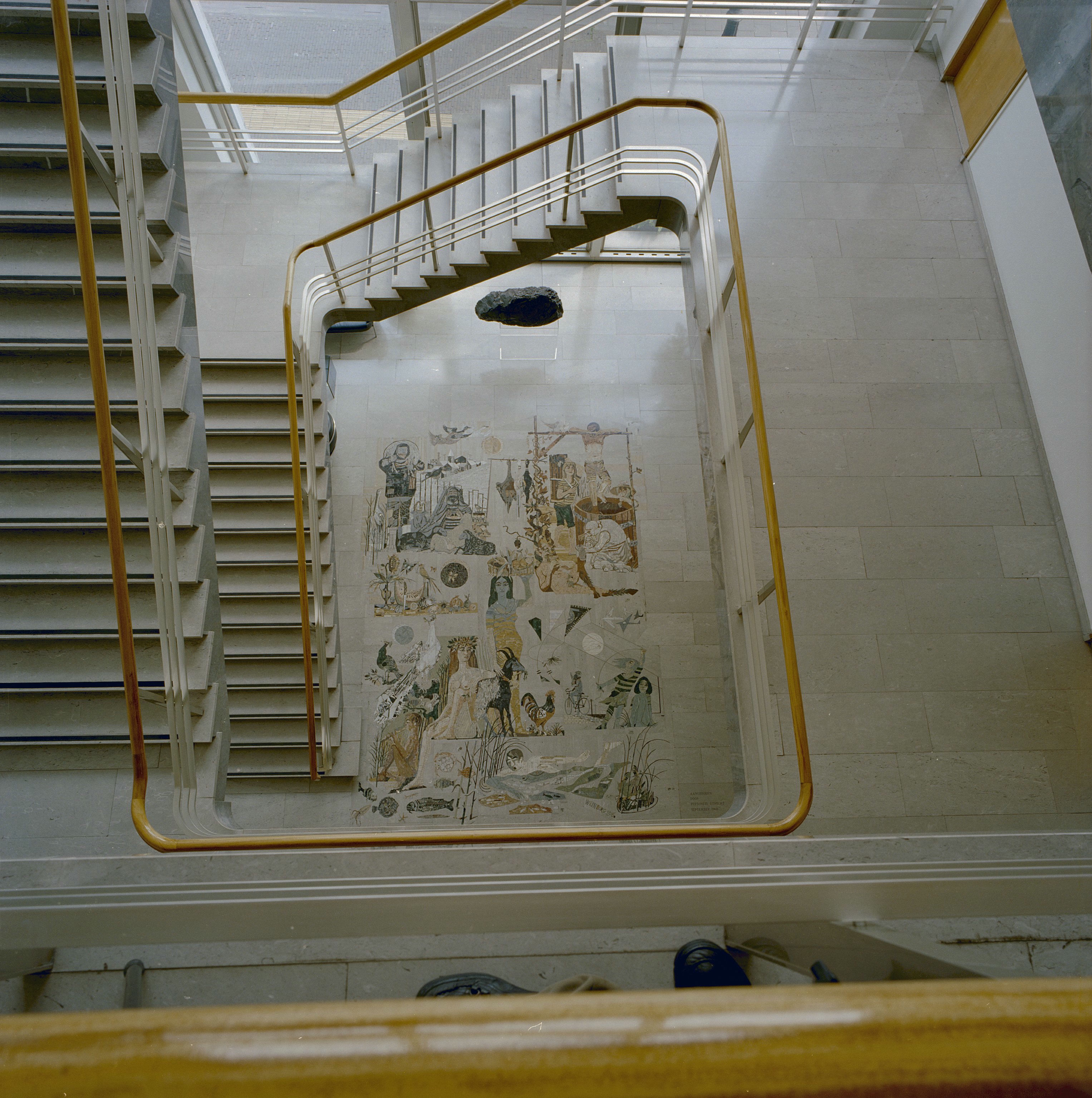 Shv-Kantoor: Interieur hoofdtrappenhuis, naar beneden gezien met mozaïekvloer op de begane grond (opmerking: Gefotografeerd voor Toonbeelden van de Wederopbouw)